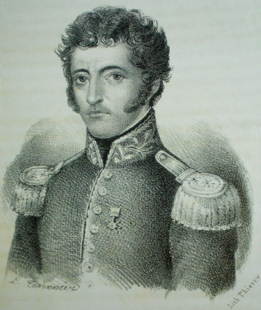 Young José Tadeo Monagas